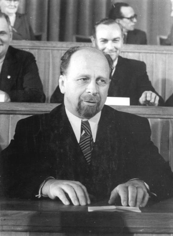 Illus Sturm Kno-Be. 15.11.1950 Neue Regierung der Deutschen Demokratischen Republik gebildet. Am 15.11.1950 trat die Volkskammer zu ihrer 2. Plenarsitzung zusammen. Auf der Tagesordnung stand die Erklärung des Ministerpräsidenten über die Bildung und das Programm der Regierung der DDR.UBz: Stellvertretender Ministerpräsident Walter Ulbricht. Leihweise Illus Berlin W8 Wegen Hamann 6.6.1969 Hg Gesperrt